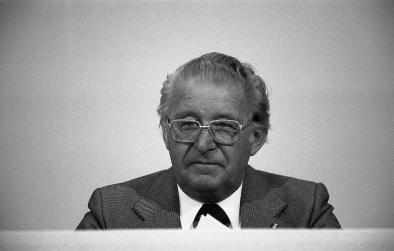 26. Bundesparteitag der CDU in der Friedrich-Ebert-Halle in Ludwigshafen 23.-25.10.1978